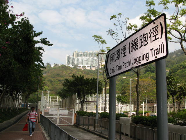 中文（香港）: 香港荃灣照潭徑